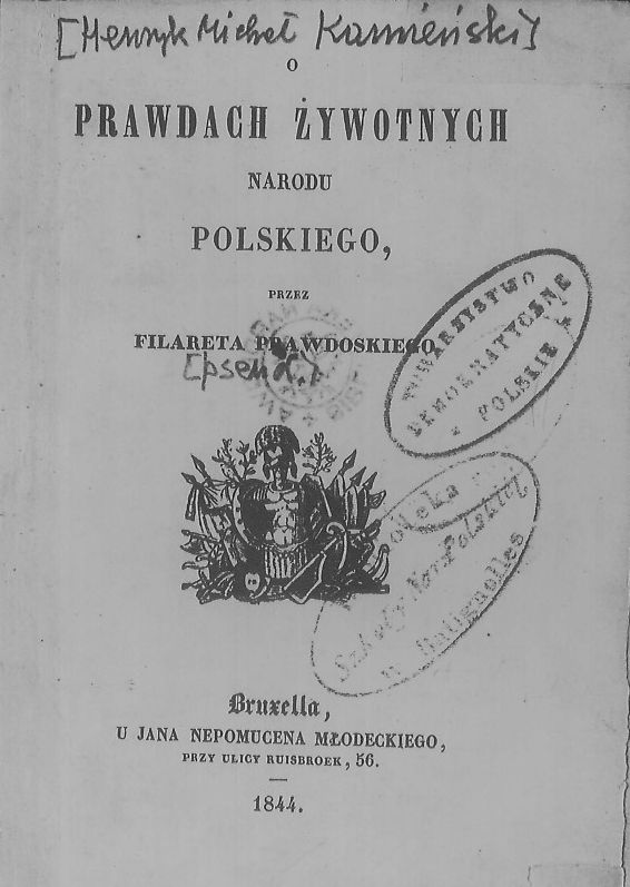 Henryk Kamieński, O prawdach żywotnych narodu polskiego, Bruksela 1844Latina: Henricus Kamienski, De veritatibus vivificis nationis polonicae, Bruxellae 1844